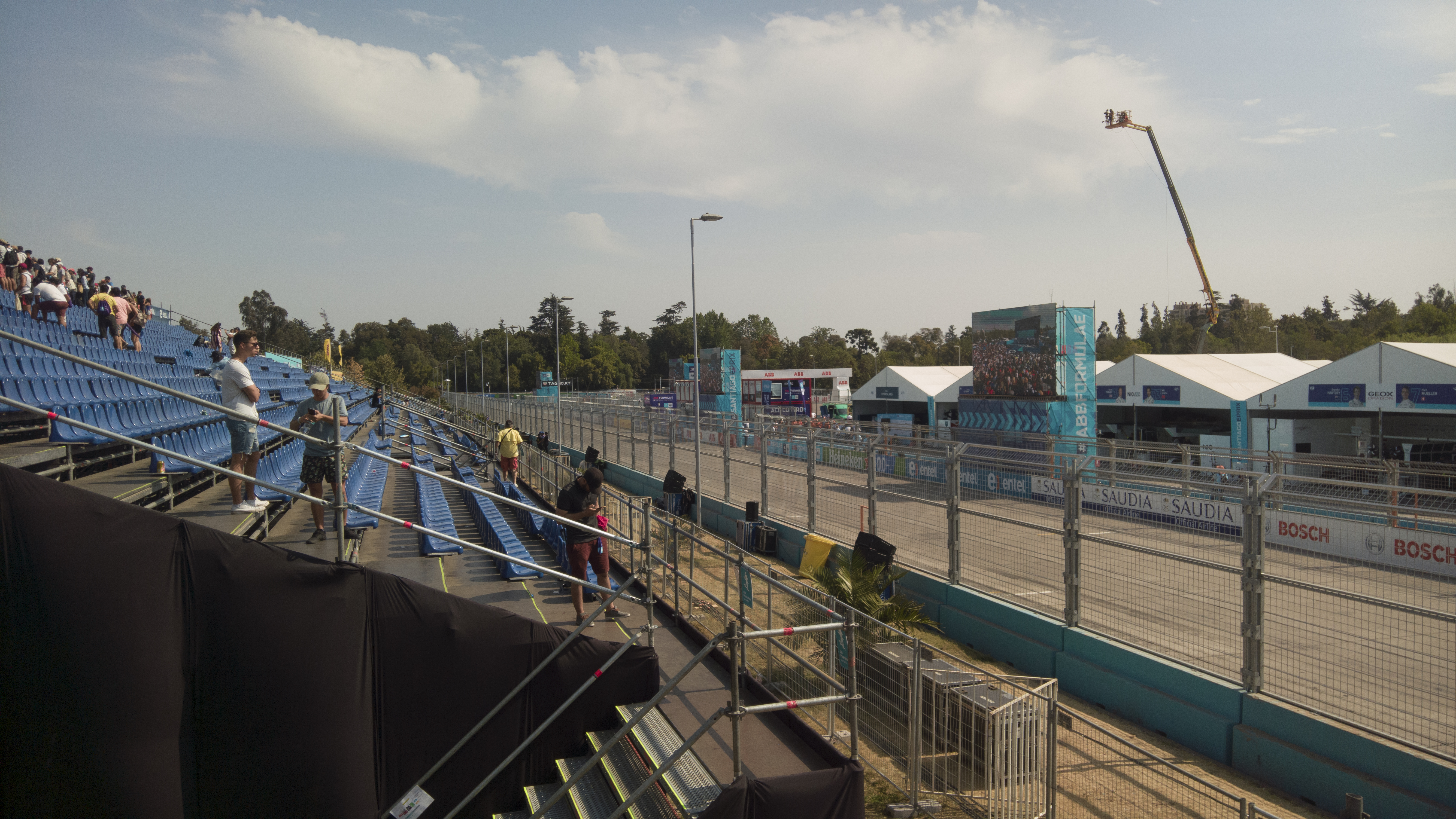 Vista parcial de la recta del circuito del parque O'Higgins, tras el Santiago ePrix de 2020, en Santiago (Chile).